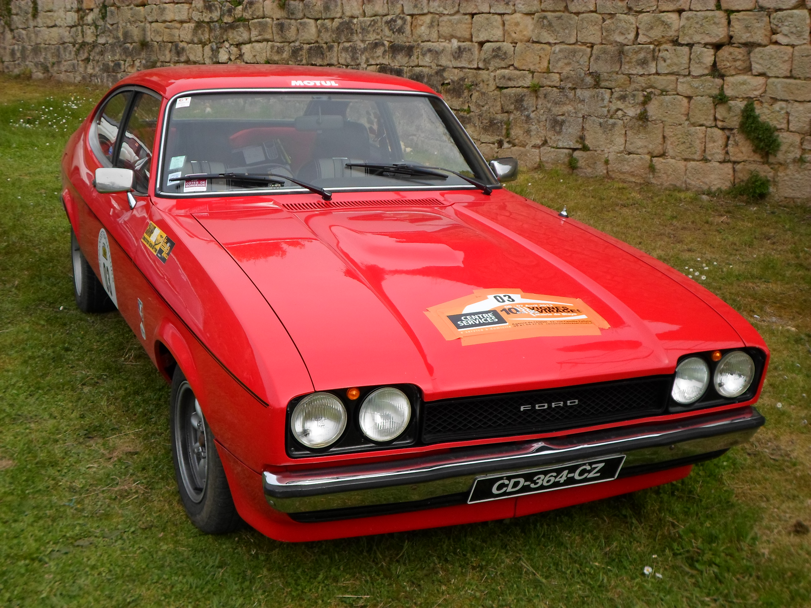 Ford Capri Blaye 2013